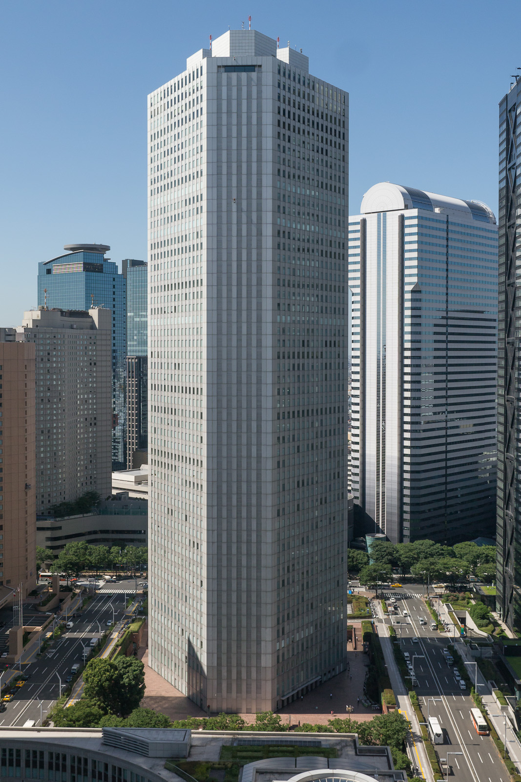 都庁展望室から見た新宿住友ビル。